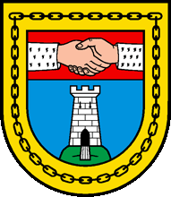 Armoiries de l'ancienne commune des Bayards Auteur : Gérard Crameri